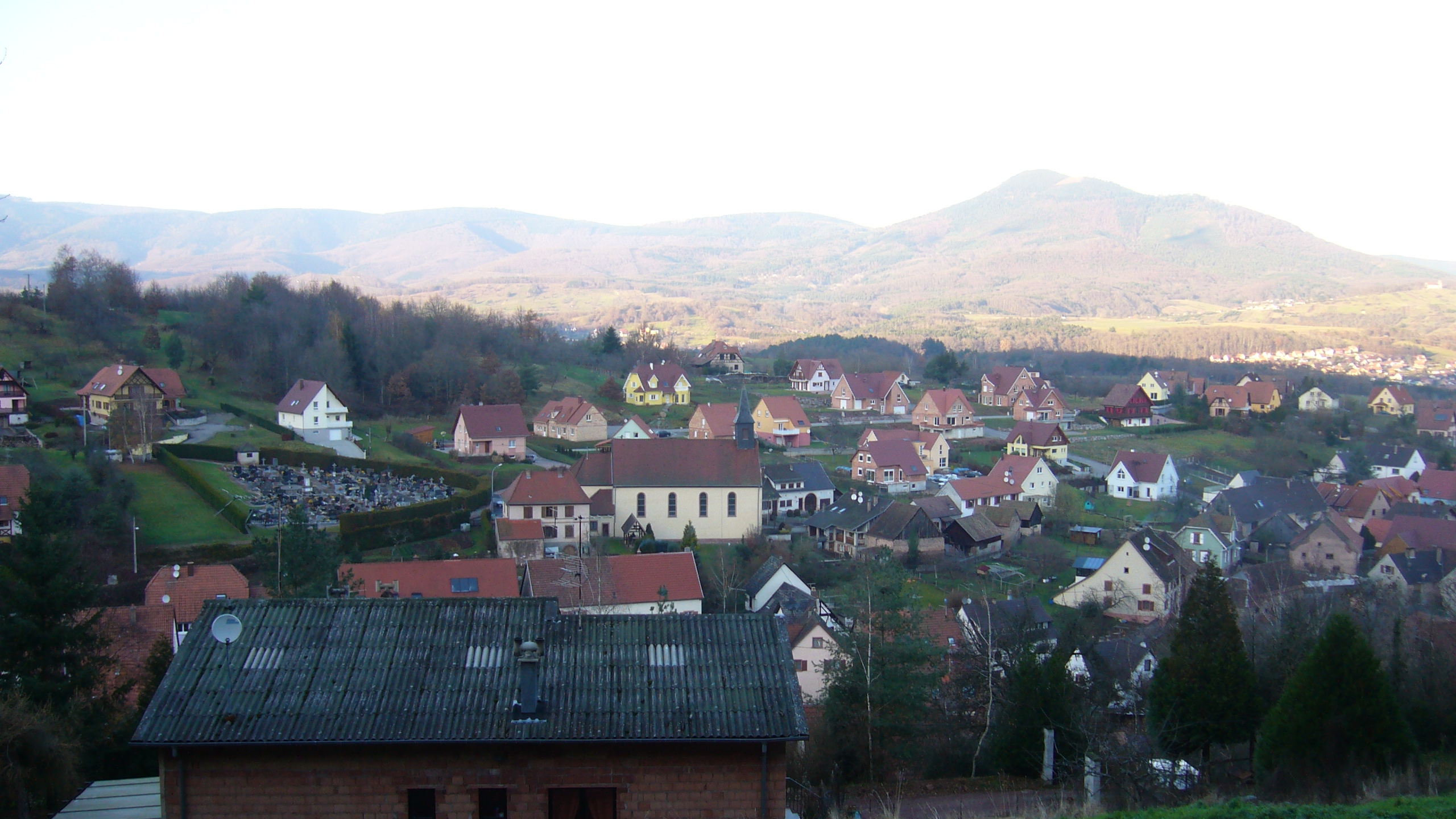 Neubois vu au-dessus du village